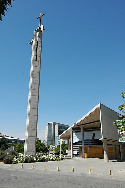 Santiago_ 610